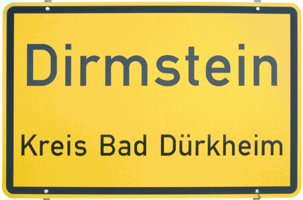 Ortsschild von Dirmstein, selbst fotografiert am 14.09.2006 und freigegeben durch Benutzer:Mundartpoet